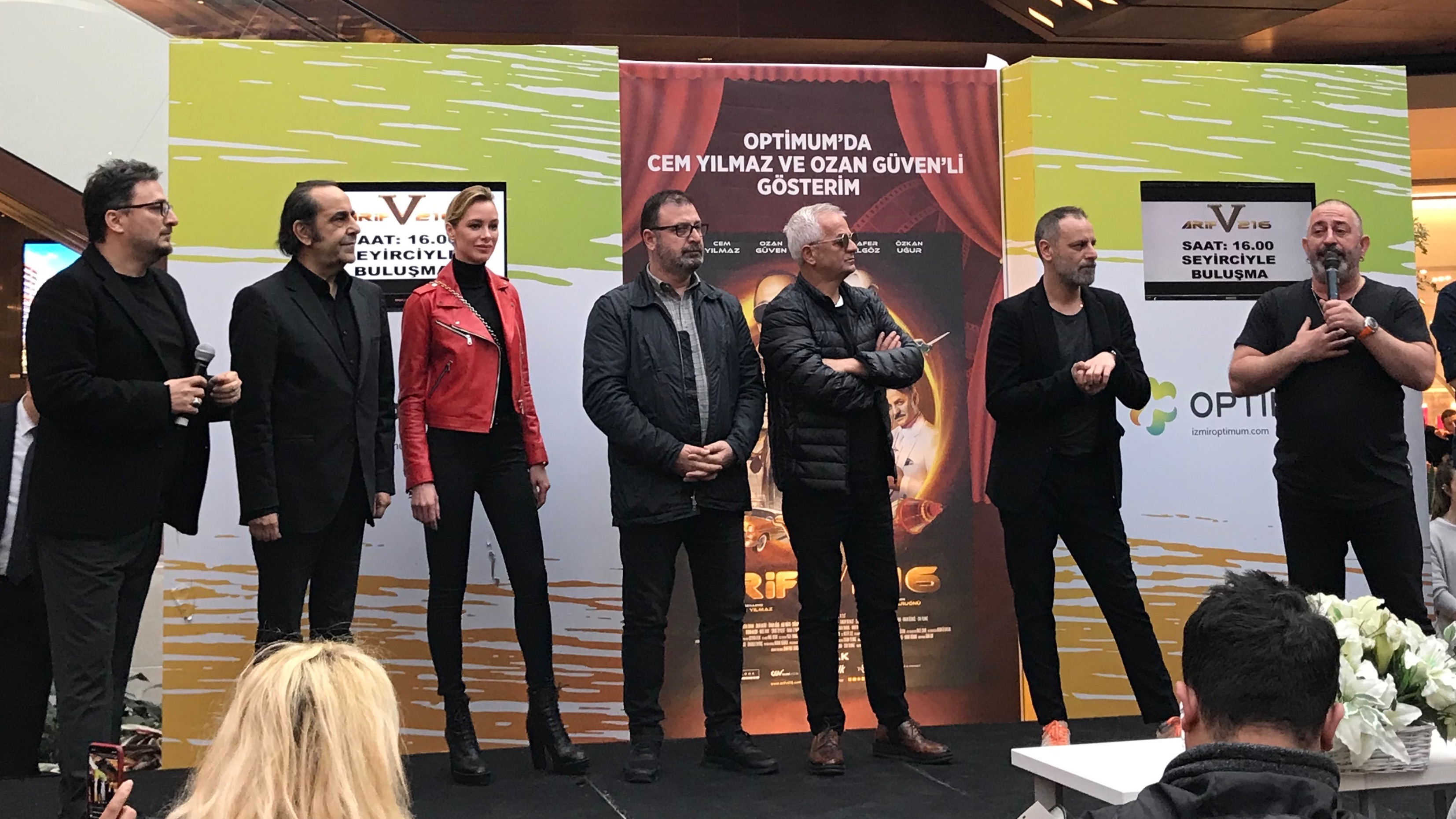 Arif V 216 filminin yönetmeni ve oyuncuları İzmir galasında.